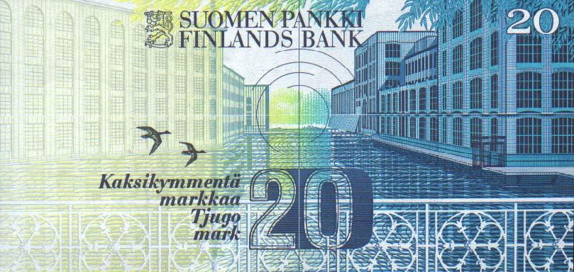 20 markkaa